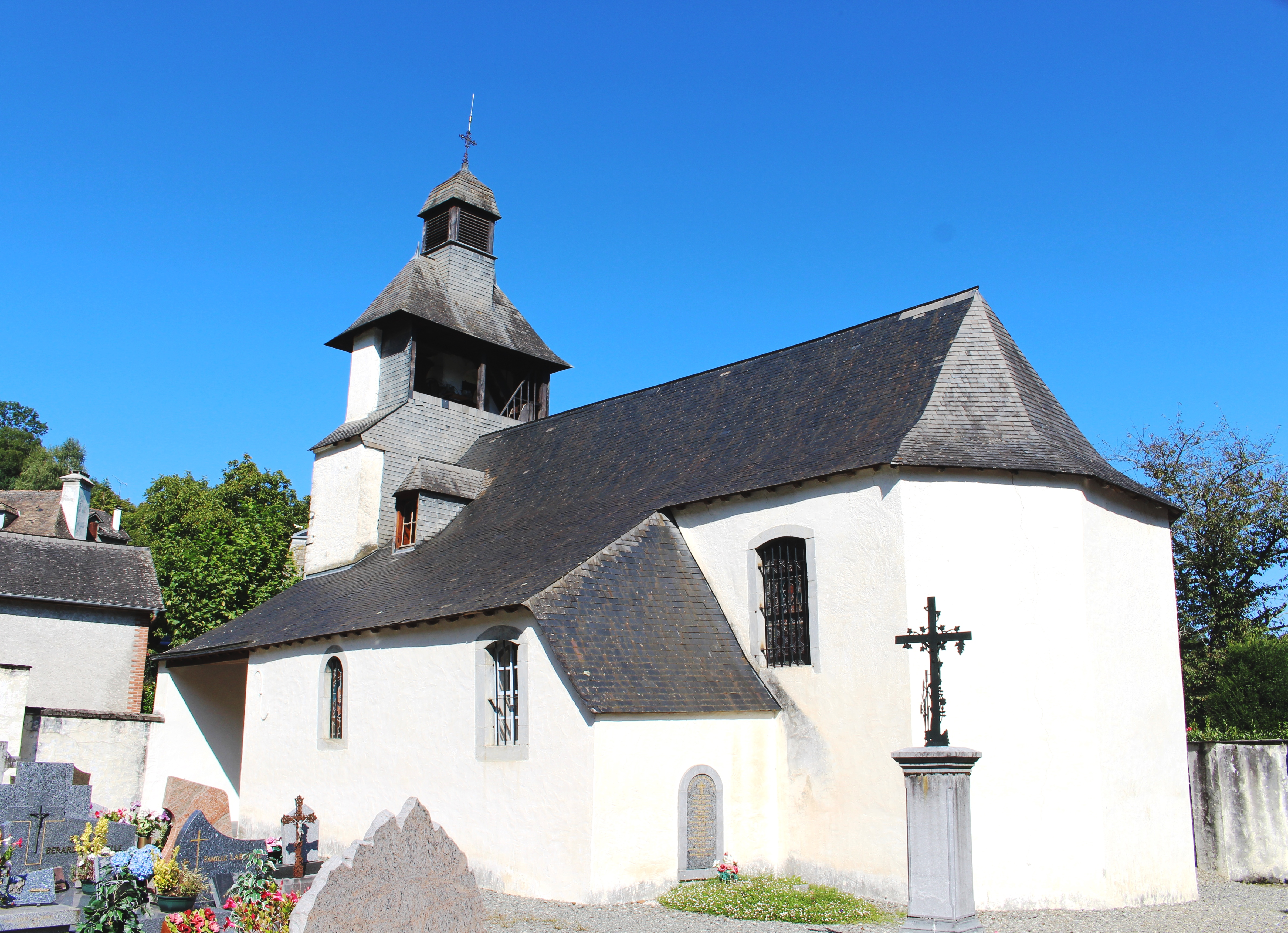 Église Saint-Étienne des Angles (Hautes-Pyrénées)